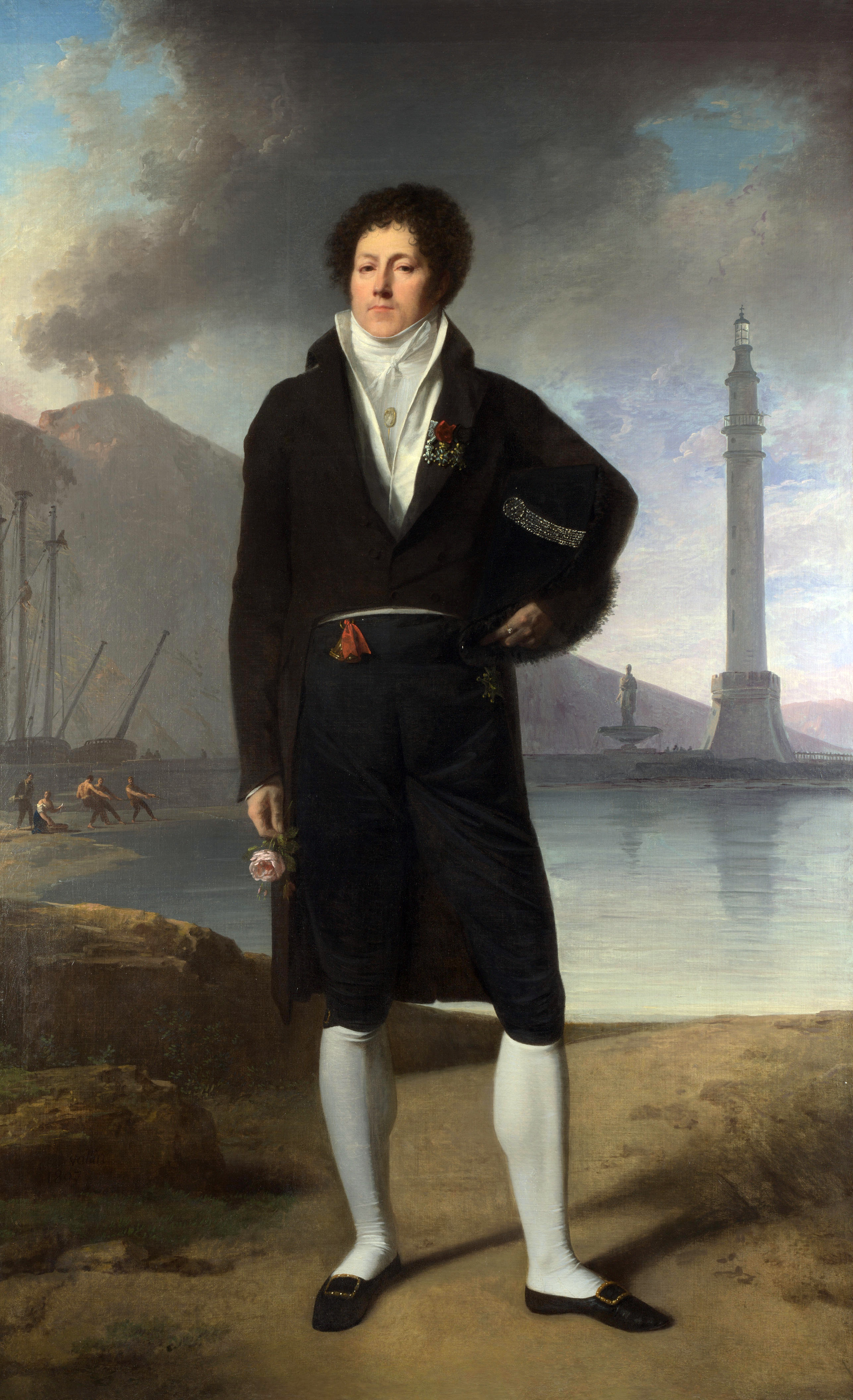 Ritratto di Giuseppe Forlenza (Joseph Forlenze)